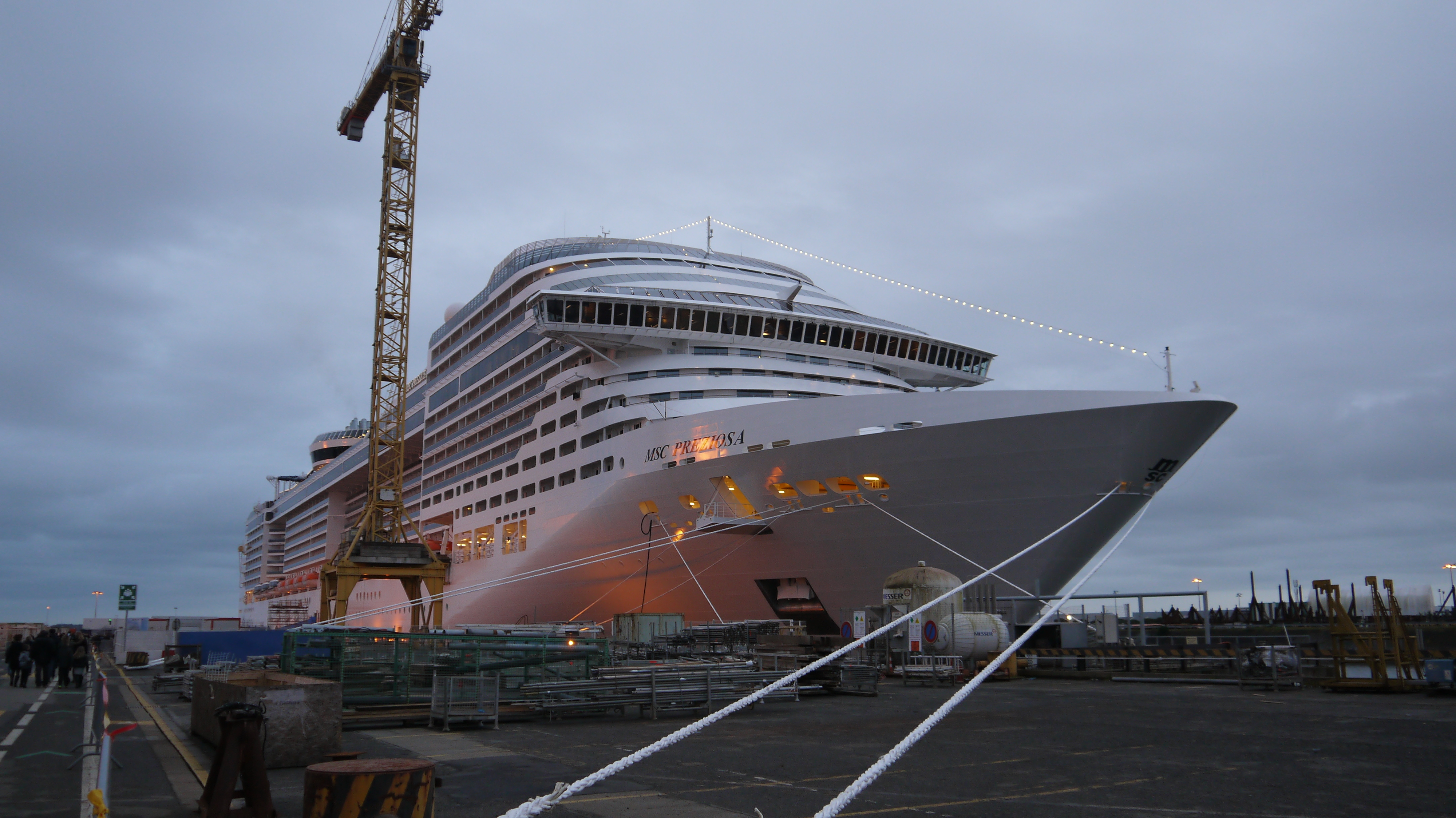 Le palace flottant "MSC Preziosa" prêt à être livré par les chantiers STX France à Saint-Nazaire.